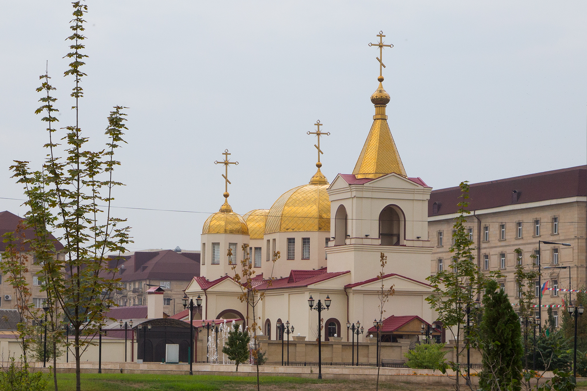 Церковь Михаила Архангела: проспект Ленина, 21, Грозный, Чеченская республика